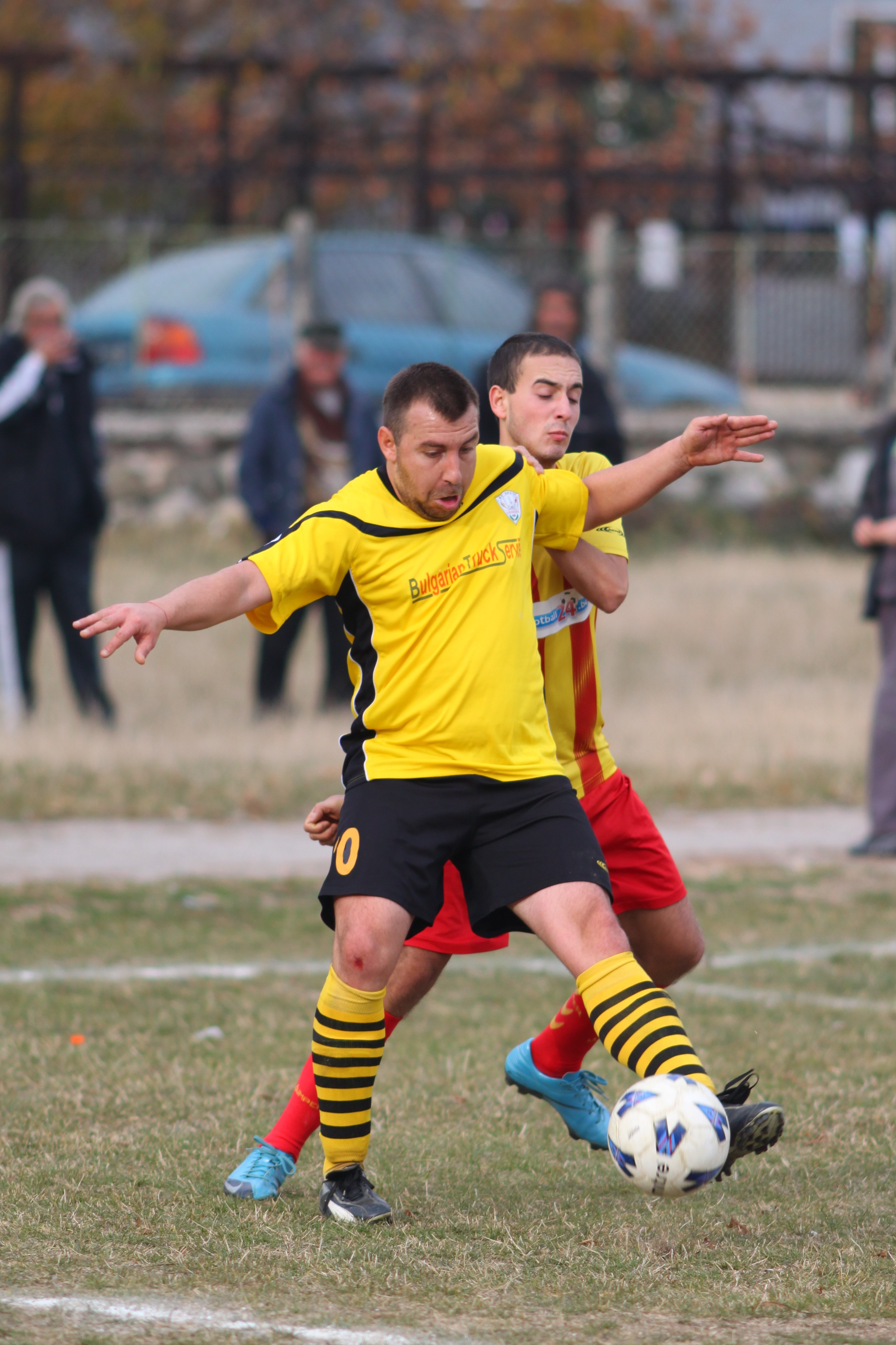 Любомир Виденов (по прякор „Фолца“) е български футболист, нападател, състезател на ФК Вихър (Алдомировци).